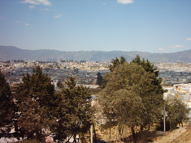 Vista de Quetzaltenango desde la colina de la Pedrera. (Foto. Lic. Marco Aguilar 2005)